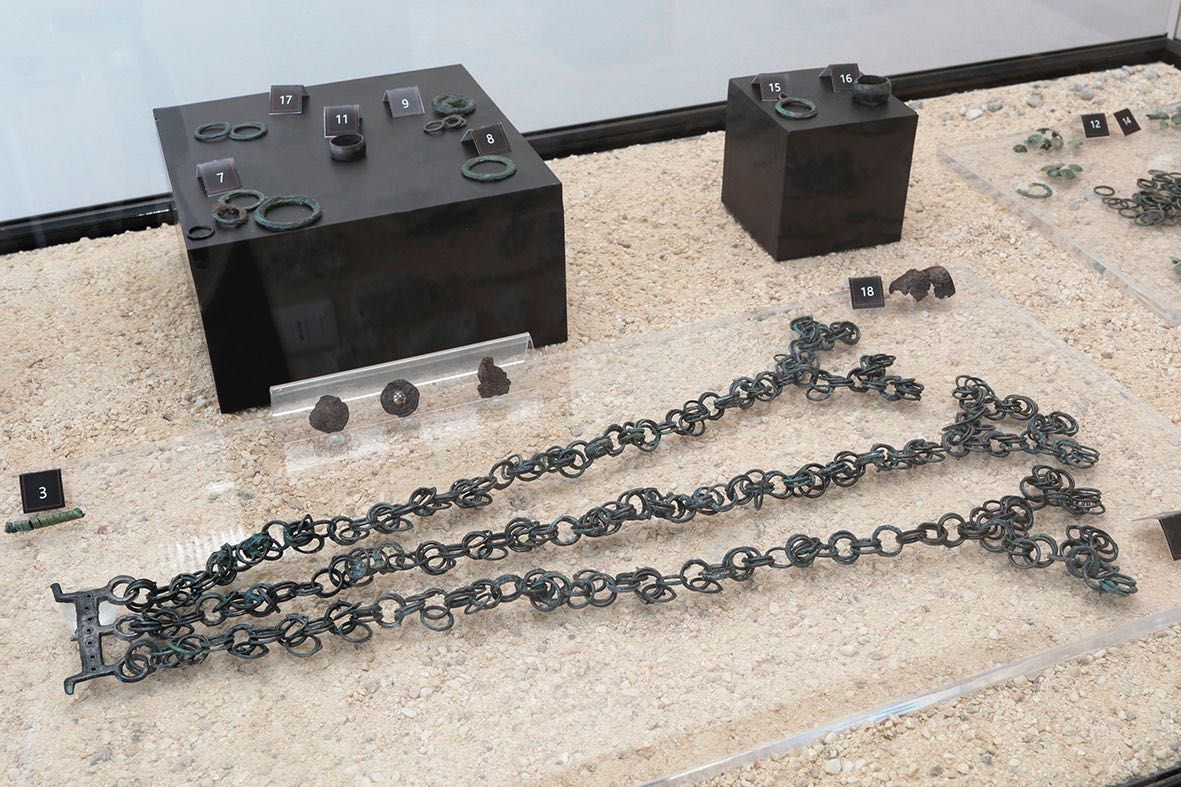 immagine di una delle teche espositive della sezione archeologica